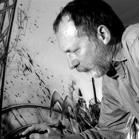 Porträt des Zeichners Uwe Ernst in einer Arbeitssituation